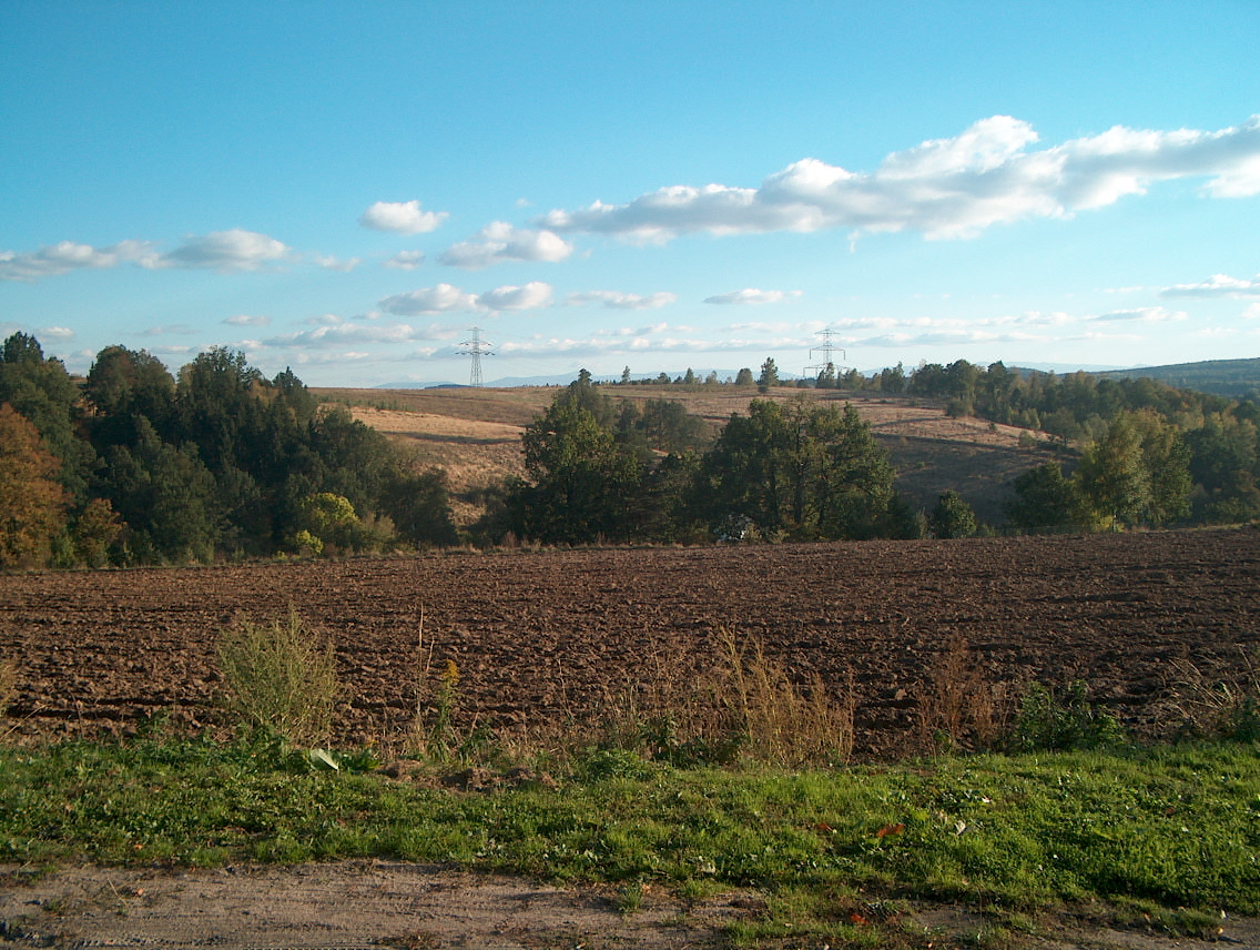 Pogórze Izerskie w okolicach Lwówka Śląskiego.